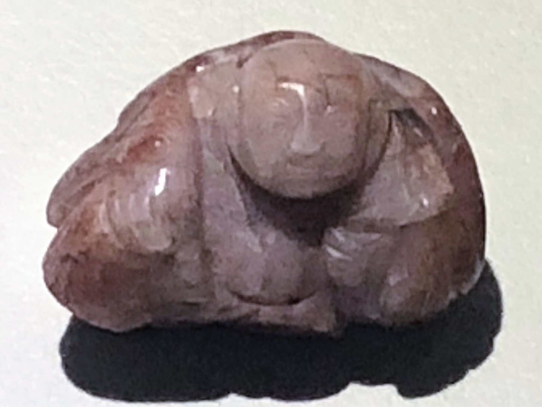 芙蓉石弥勒佛像 明 李塔地宫出土